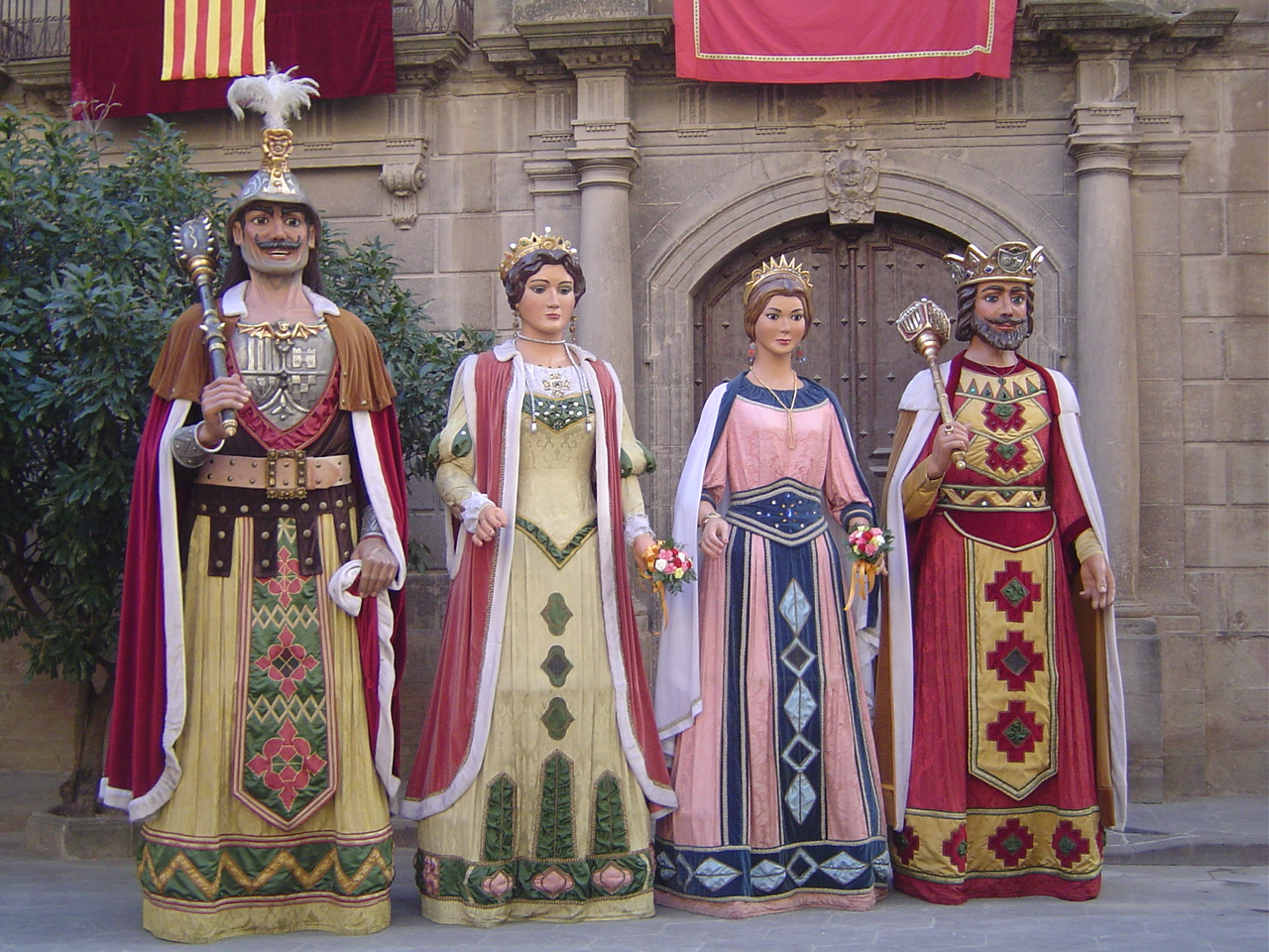 Imatge dels Gegants de Solsona, durant la Festa Major de 2005.